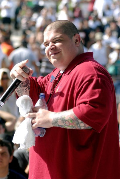 Vinnie Paz (2007)